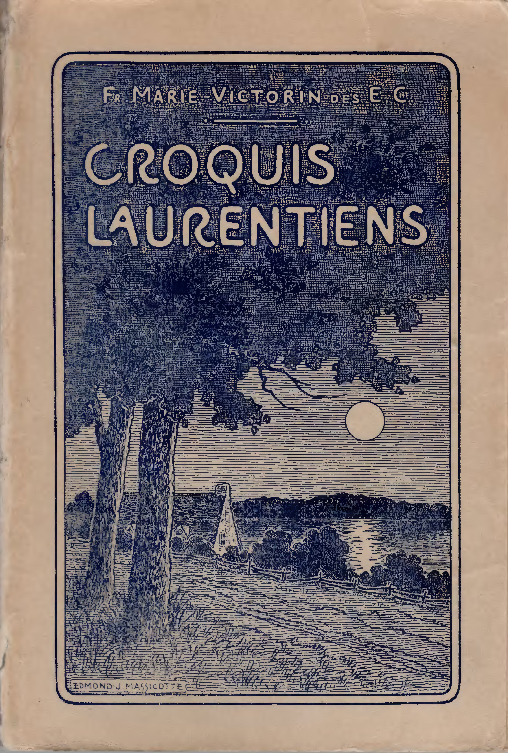 Recueil de chroniques sur différentes régions du Québec.